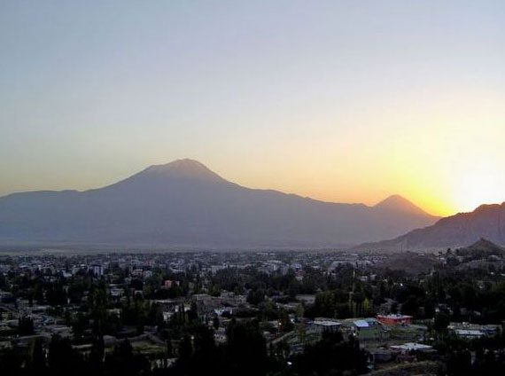 Dogubeyazit Gün Doğumu Fotoğraf Gökmen Önay